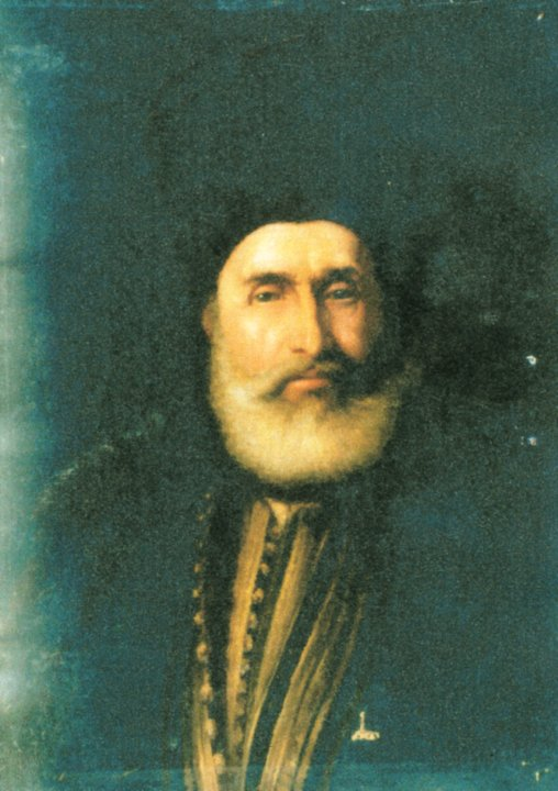 Portretul marelui ban Năsturel Herescu, ulei pe pânză, 67,7x61,5cm - Muzeul Judeţean de Istorie şi Arheologie Prahova - PLOIEŞTI. Lucrarea este din a doua jumătate a secolului XIX şi reprezintă un portret de interpretare al Marelui Ban Năsturel Herescu, lucrare foarte apreciată în epocă. Personajul este înfăţişat şezând, înveşmântat în costumul epocii, işlic negru, caftan negru brodat cu fir. Figura este redată pe trei sferturi din faţă, orientată spre dreapta tabloului. Gama cromatică este sobră. Portretul este de factură academistă din perioada de început a lui Nicolae Grigorescu. Anul 1886, înscris pe spatele lucrării, este data unei reluări dacă aparţine autorului şi nu este cumva o datare a unui eventual posesor. Nr. inventar / Accession number 6.4. – 4859 Ordin de clasare / Listing order 2044/26.01.2007 - Tezaur